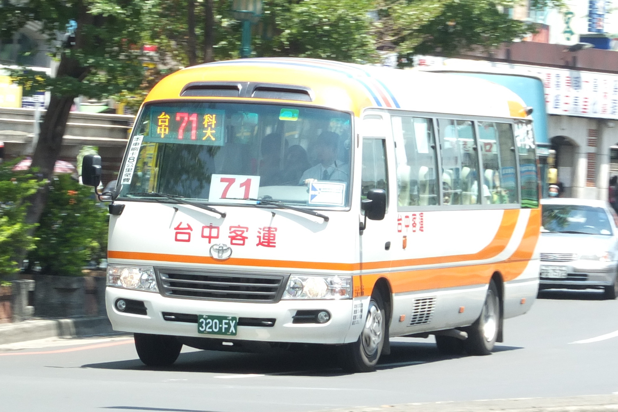 台中客運 320-FX 營運台中市公車 71 路，行駛於台中市建國路。本車為原裝 TOYOTA COASTER XZB50L-ZEMSYR。